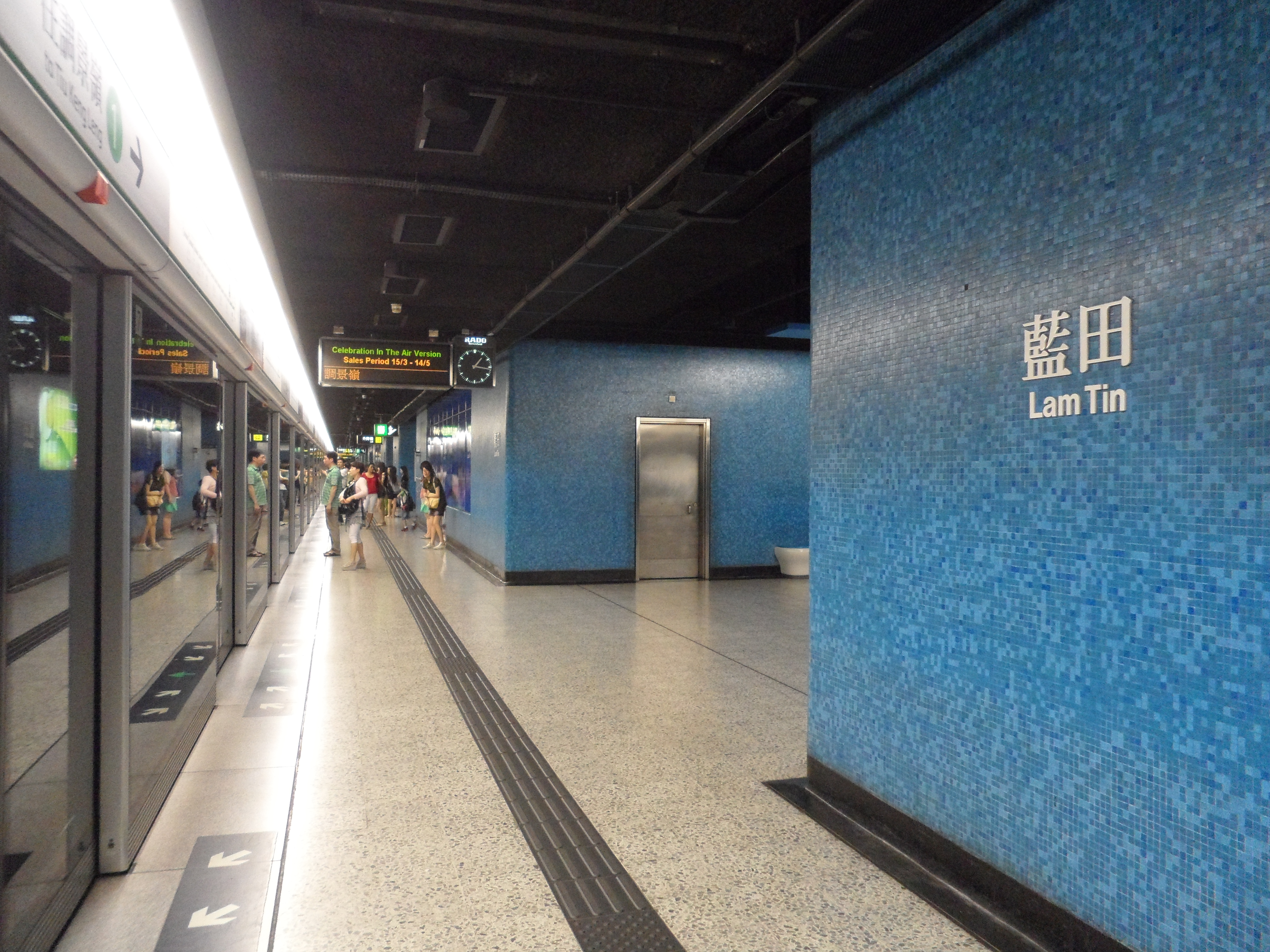 港鐵藍田站月台